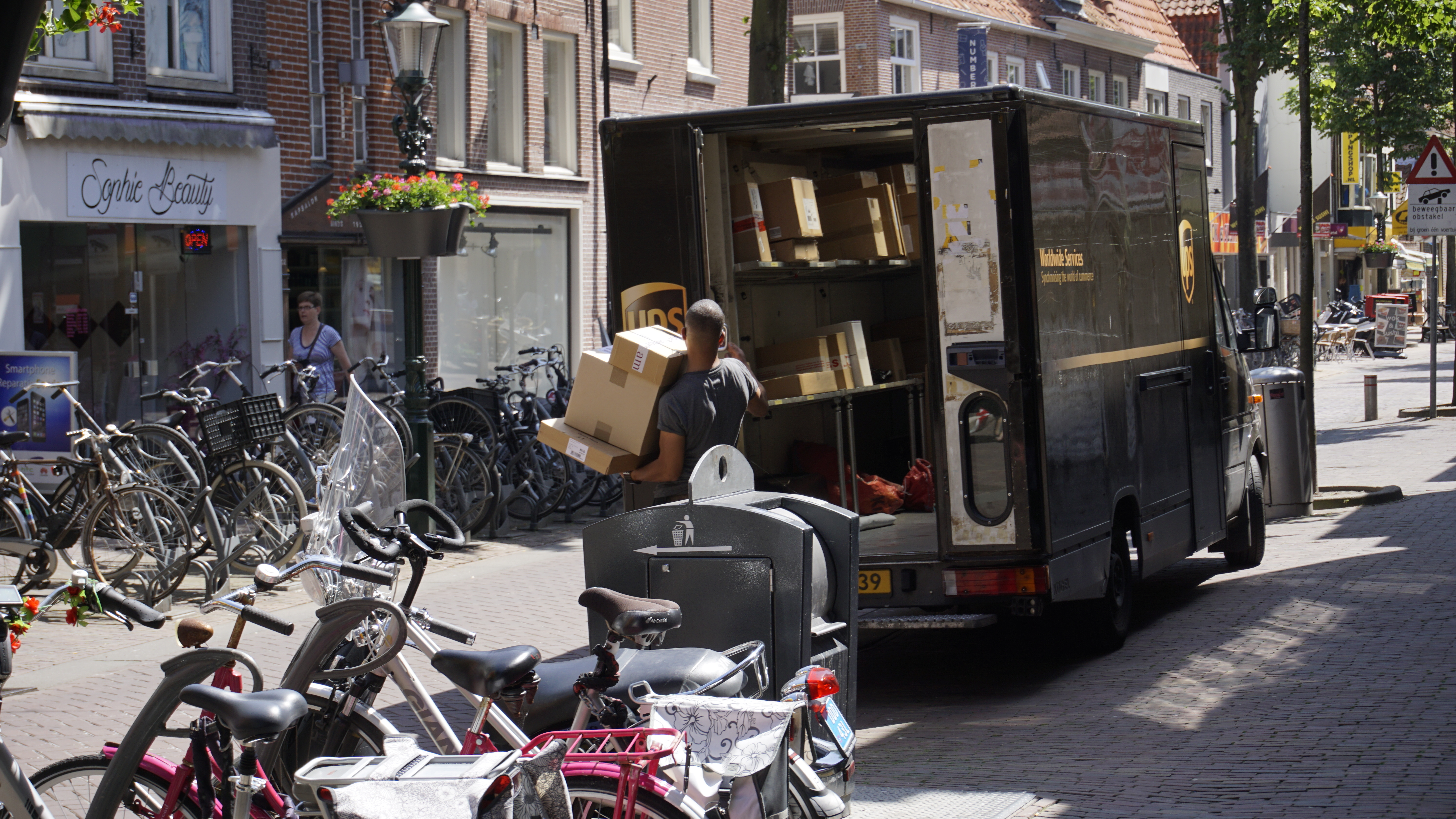 UPS van in Alkmaar